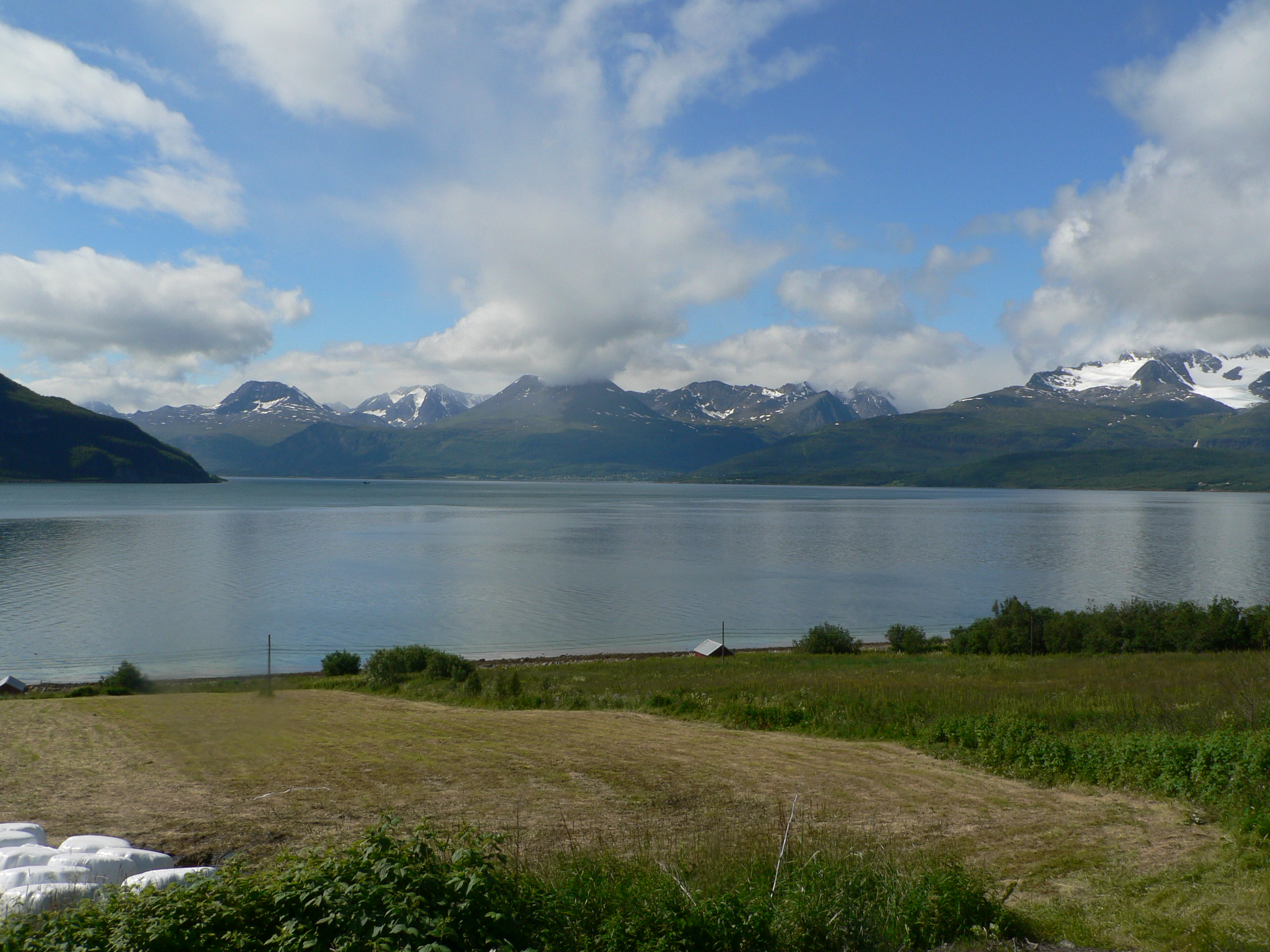 lyngsalpan